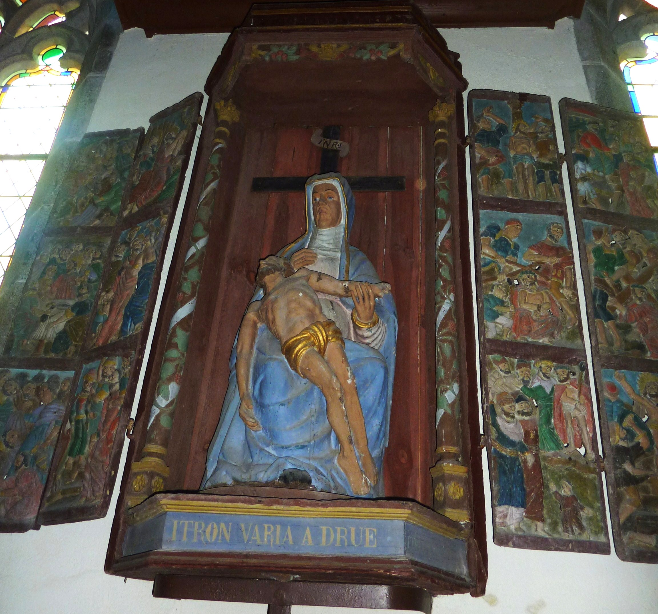 Plouyé: église paroissiale, retable